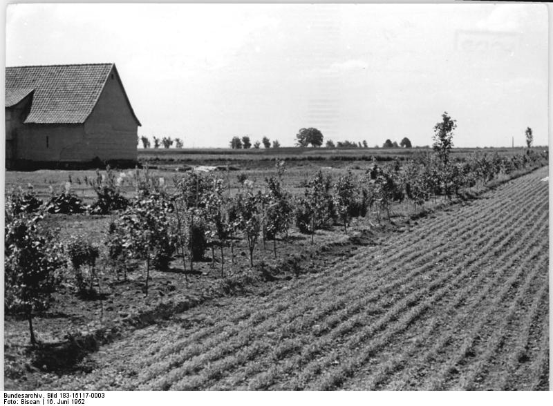 Wanzleben-Buch, Windschutzstreifen ZB-Biscan-16.6.1952 Neubauernsiedlung mit Windschutz. Windschutzstreifen nach sowjetschen Vorbild gegen die Versteppung der Magdeburger Börde. Zur Verbesserung der Bodenkultur, wie sie der Fünfjahresplan vorsieht, werden in der DDR nach sowjetischem Vorbild lange Windschutzstreifen angelegt, besonders in den Ländern Sachsen-Anhalt und Brandenburg. Allein im Bördekreis Wanzleben, einem der Schwerpunkte der sich auf Jahre erstreckenden Aktion wurden in der letzten Pflanzzeit rund 600.000 Wildgehölze und 10.000 Obstbäume gesetzt. In der Neubauernsiedlung Wanzleben-Buch wurde eine Schulbeispiel geschaffen, indem jedes Gehöft und die ganze Siedlung mit Windschutzhecken gesichert wurde. In wenigen Jahren wird sich an diesem Beispiel zeigen, wie die Ertäge durch zweckmässigen Windschutz gesteigert werden können. UBz: Der dreireihige Windschutzstreifen, der sich rund um die ganze Siedlung zieht. Er besteht ais rimd 20 verschiedenen Baum- und Strauchartigen Wildgehölzen.